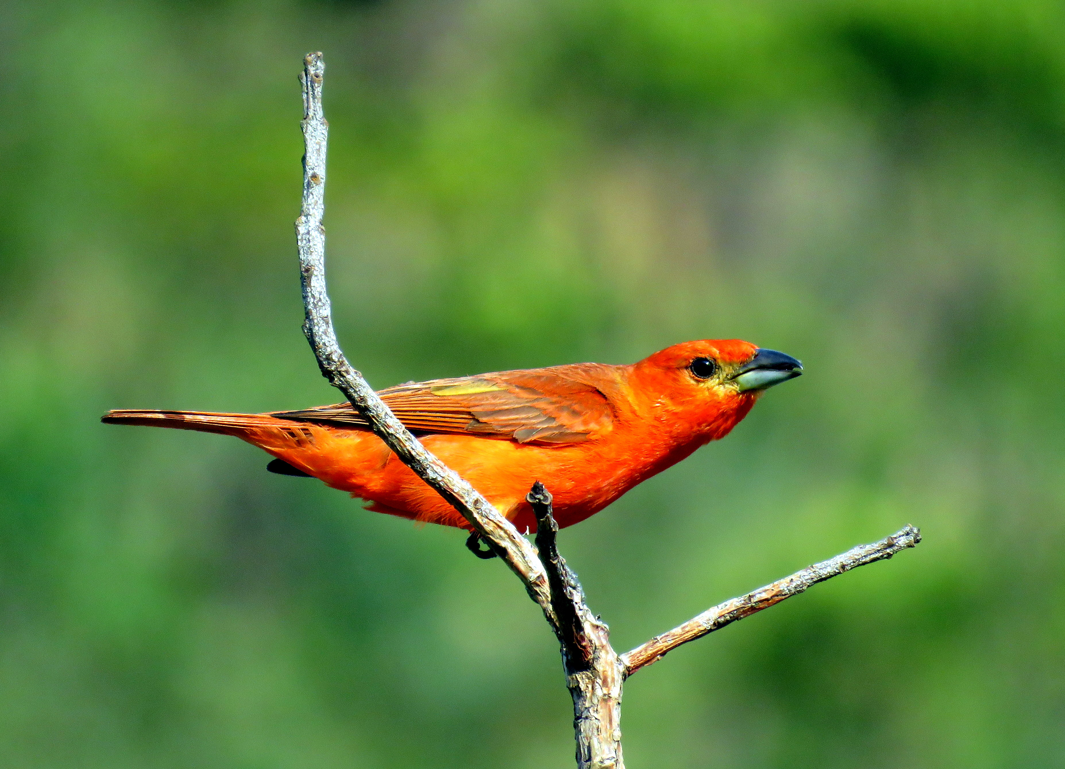 Piranga flava ou Sanhaço-de-fogo macho registrado na Serra do Cipó-Minas Gerais-Brasil